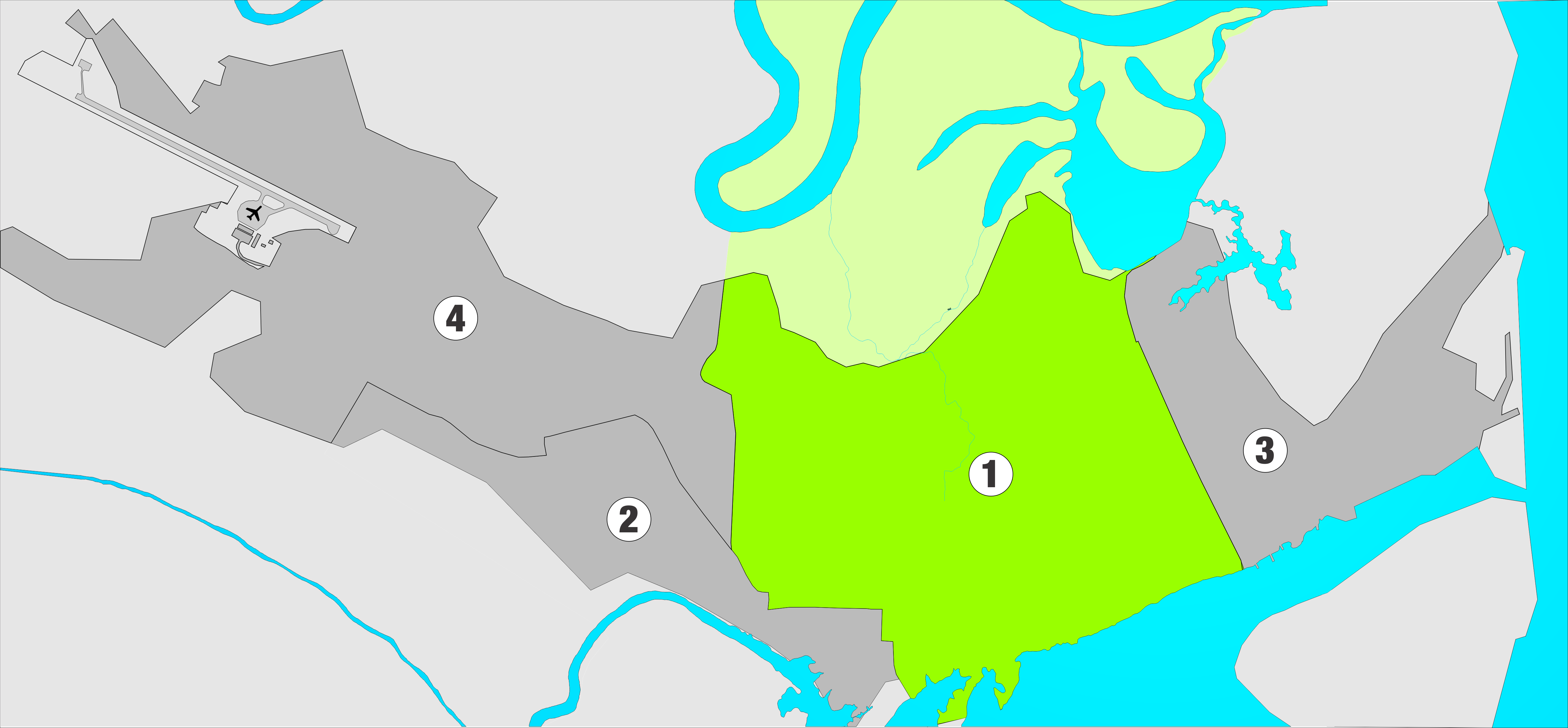 Distrito de Iquitos en el mapa de Iquitos.